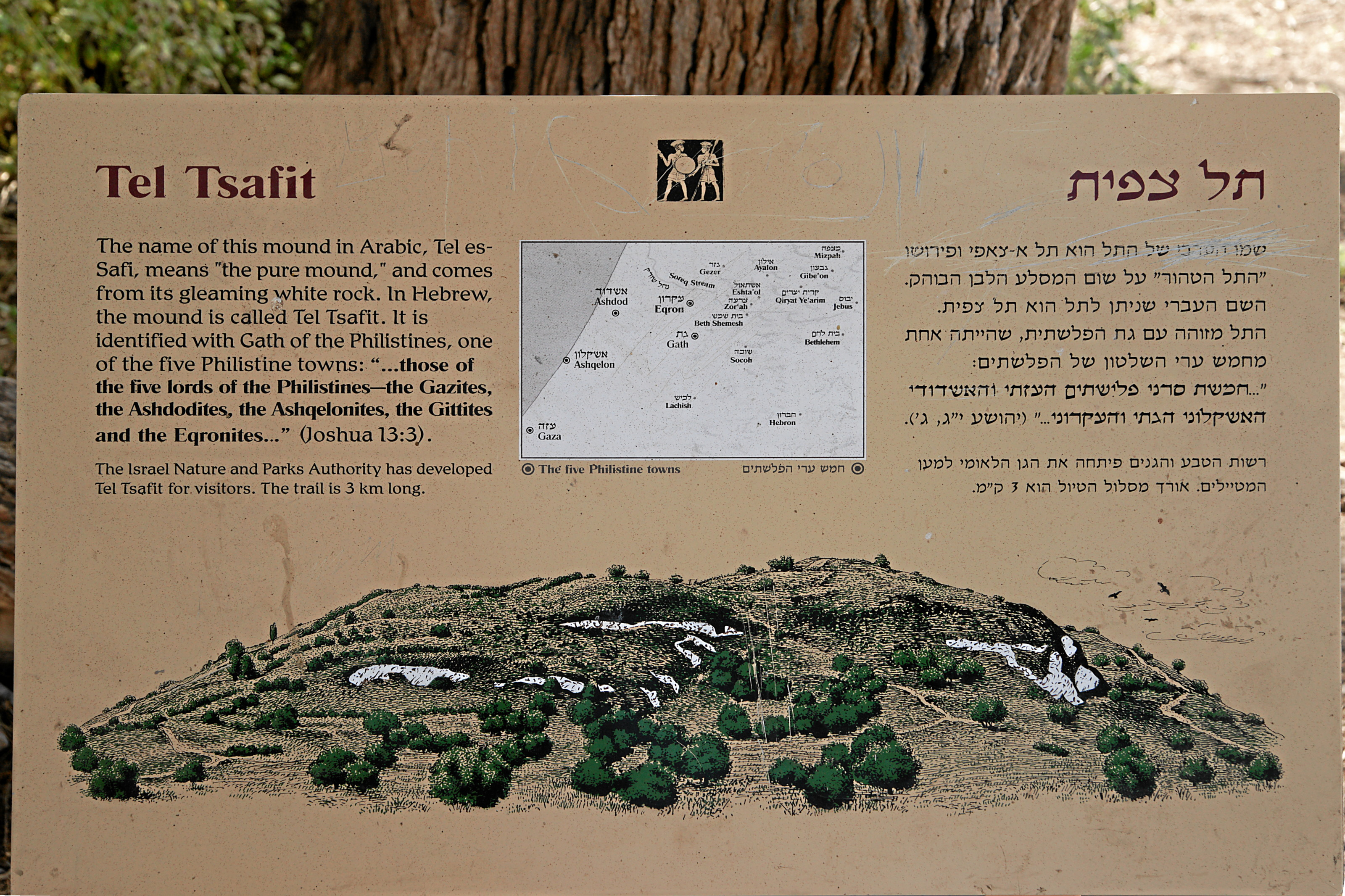 Tel Tsafit: Infotafel